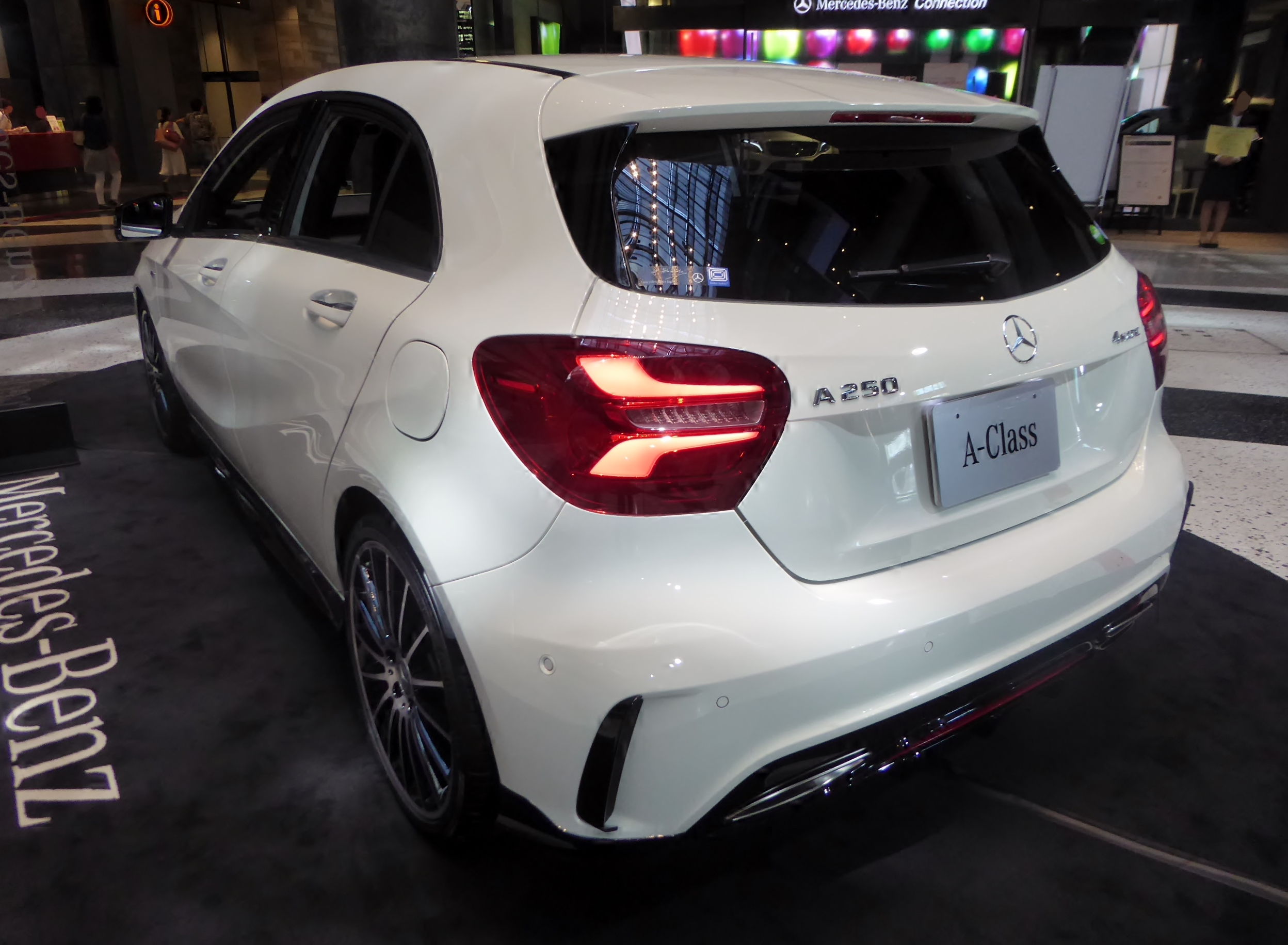 W176型メルセデス・ベンツ・A250シュポルト4マティックをリアから撮影。